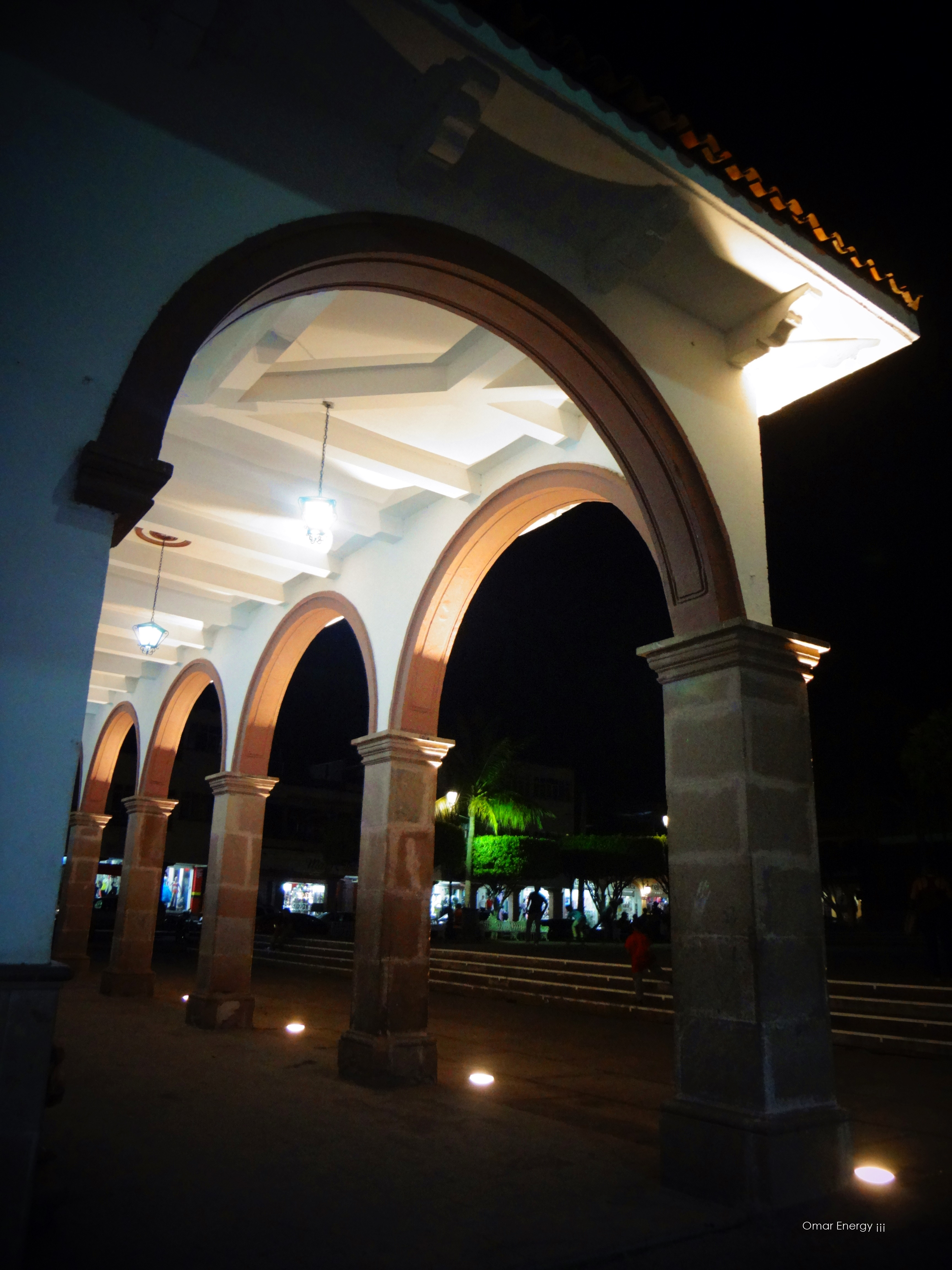 Portales de la Casa de la Constitución en Apatzingan. BBúscame en Facebook y en Youtube como; Omar Energy ¡¡¡ .